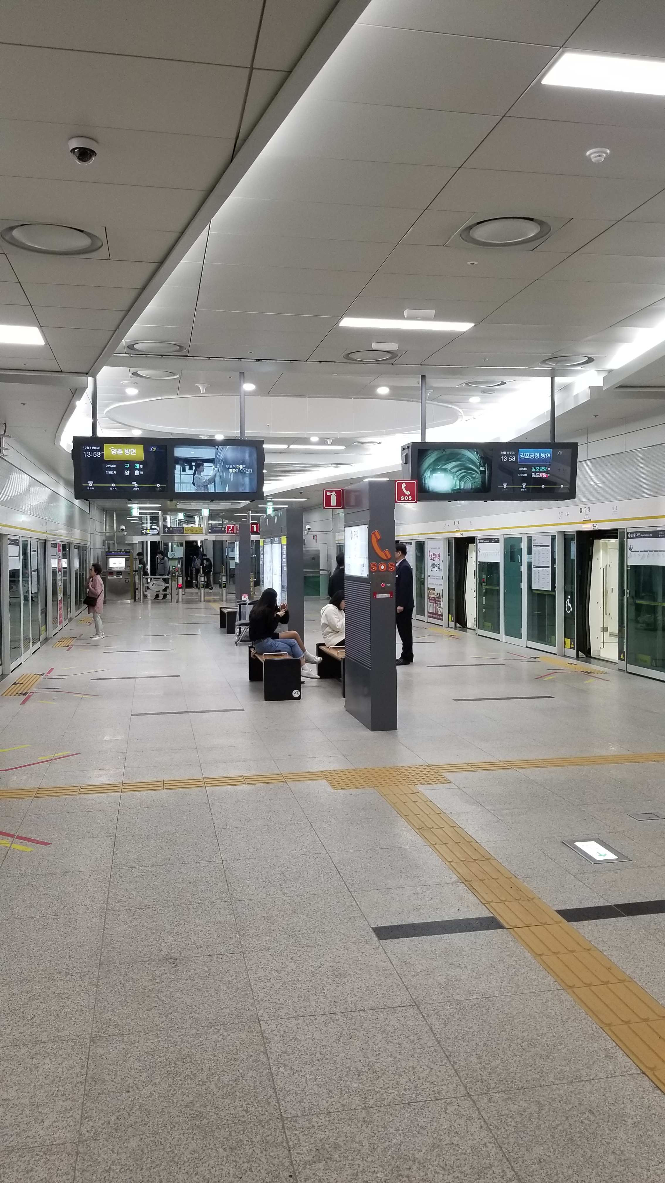 김포도시철도 구래역 승차장